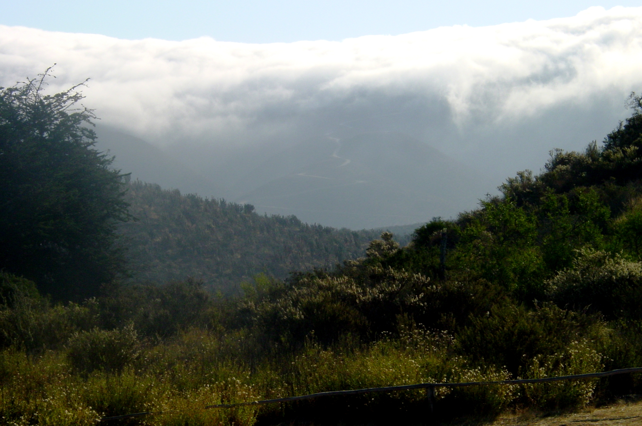 Camanchaga sur le parc Fray Jorge, province de Limari, région IV